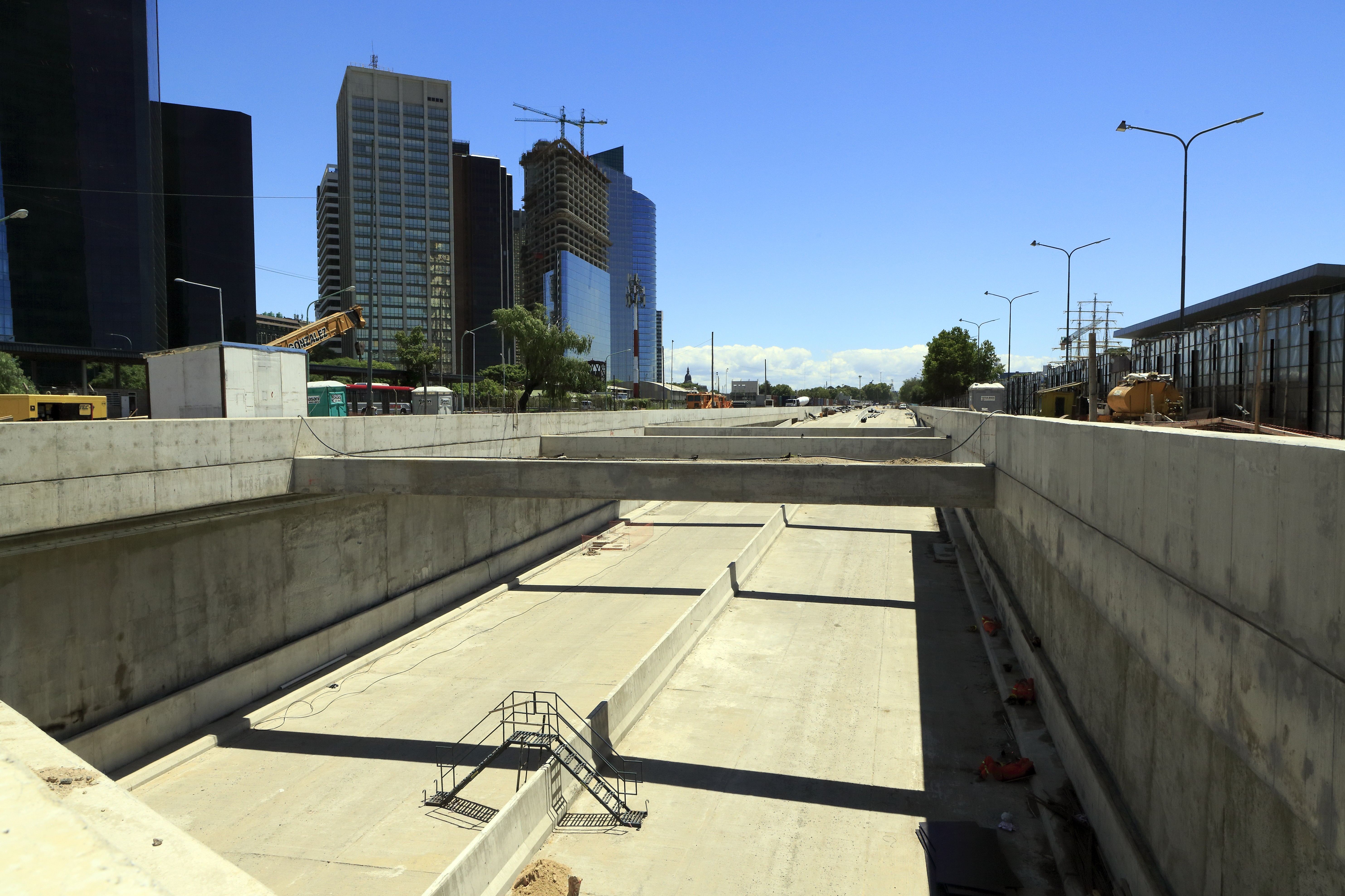 Richtung Norden, diese neugebaute Schnellstraße war der Grund für die Aufgabe der erst 2007 hoffnungsvoll eingerichteten Tranvía del Este. Offiziell soll diese Schnellstraße den Lkw-Verkehr kanalisieren, doch praktisch zieht jeder Straßenneubau mehr Verkehr an, was wieder zu zäherem Verkehr führt – und das ausgerechnet mitten im Zentrum um Puerto Madero.Praktisch ist die Bezeichnung paseo (Spaziergang, Promenade, Flaniermeile) für solche Straßen eher eine Verhöhnung der Öffentlichkeit, doch gibt es diese Verballhornung in vielen Städten, deren Verwaltungen das Scheitern der autogerechten Stadt nicht einsehen wollen, ausgerechnet bei Hauptachsen des Kraftverkehrs öfter.